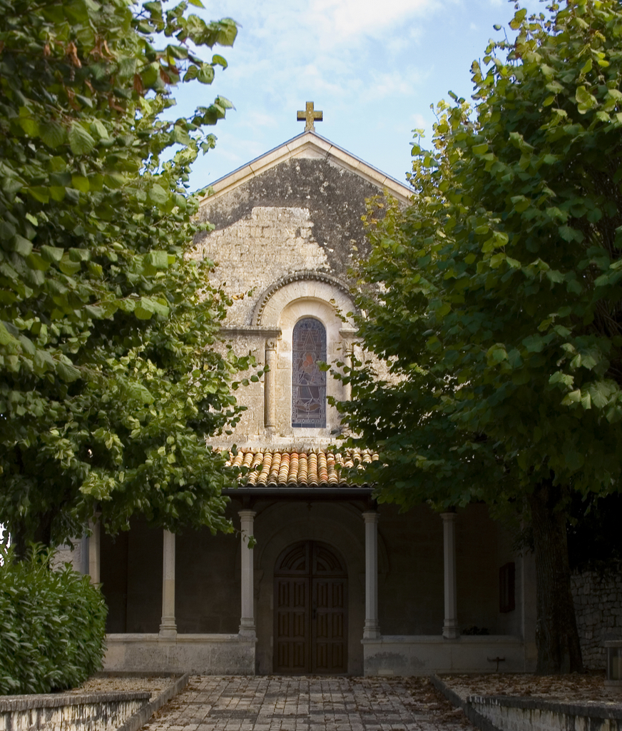 Facade et porche de l'église Saint-Pierre d'Aiffres